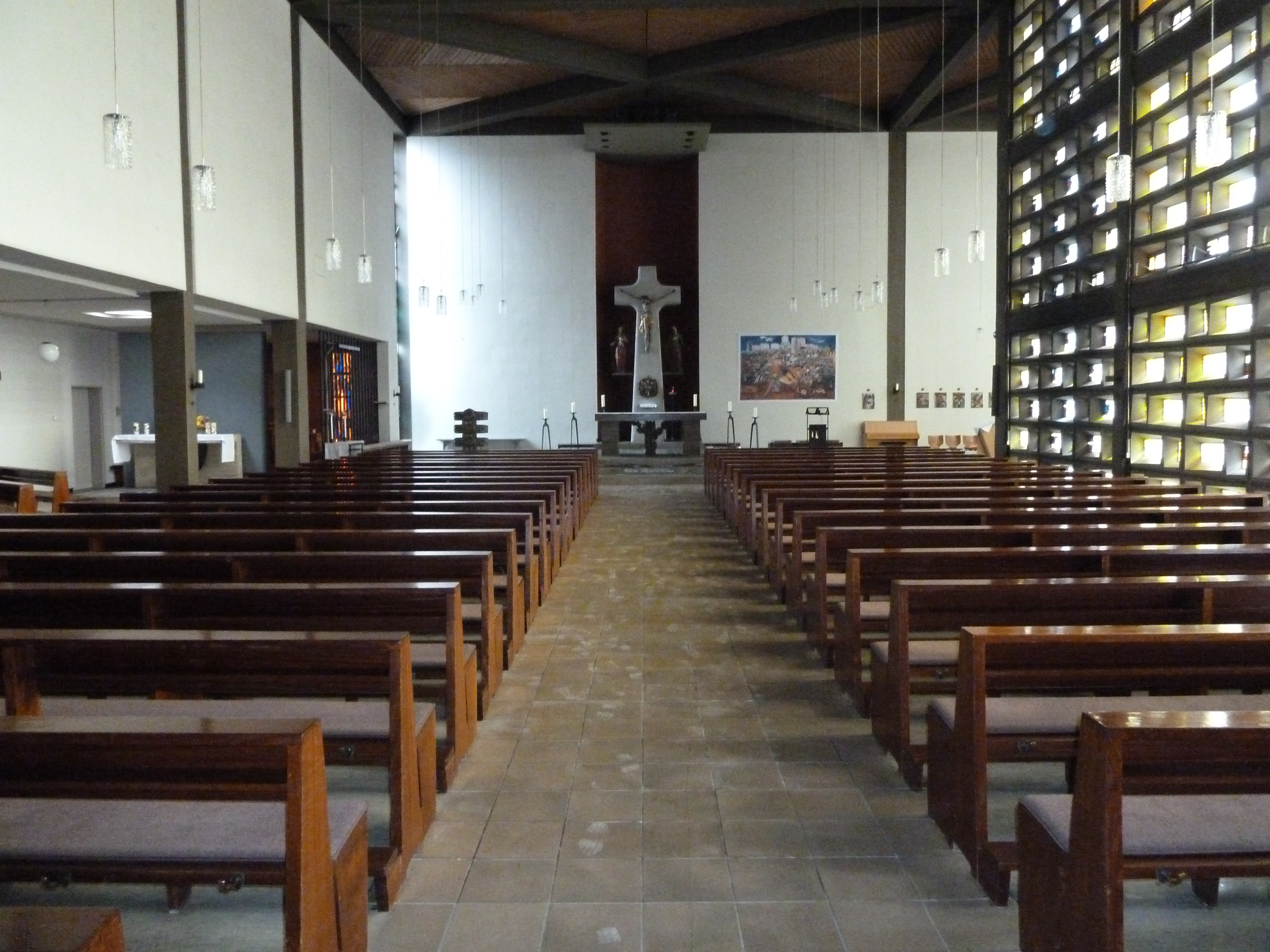 Hildesheim, Liebfrauenkirche (kath.), innen